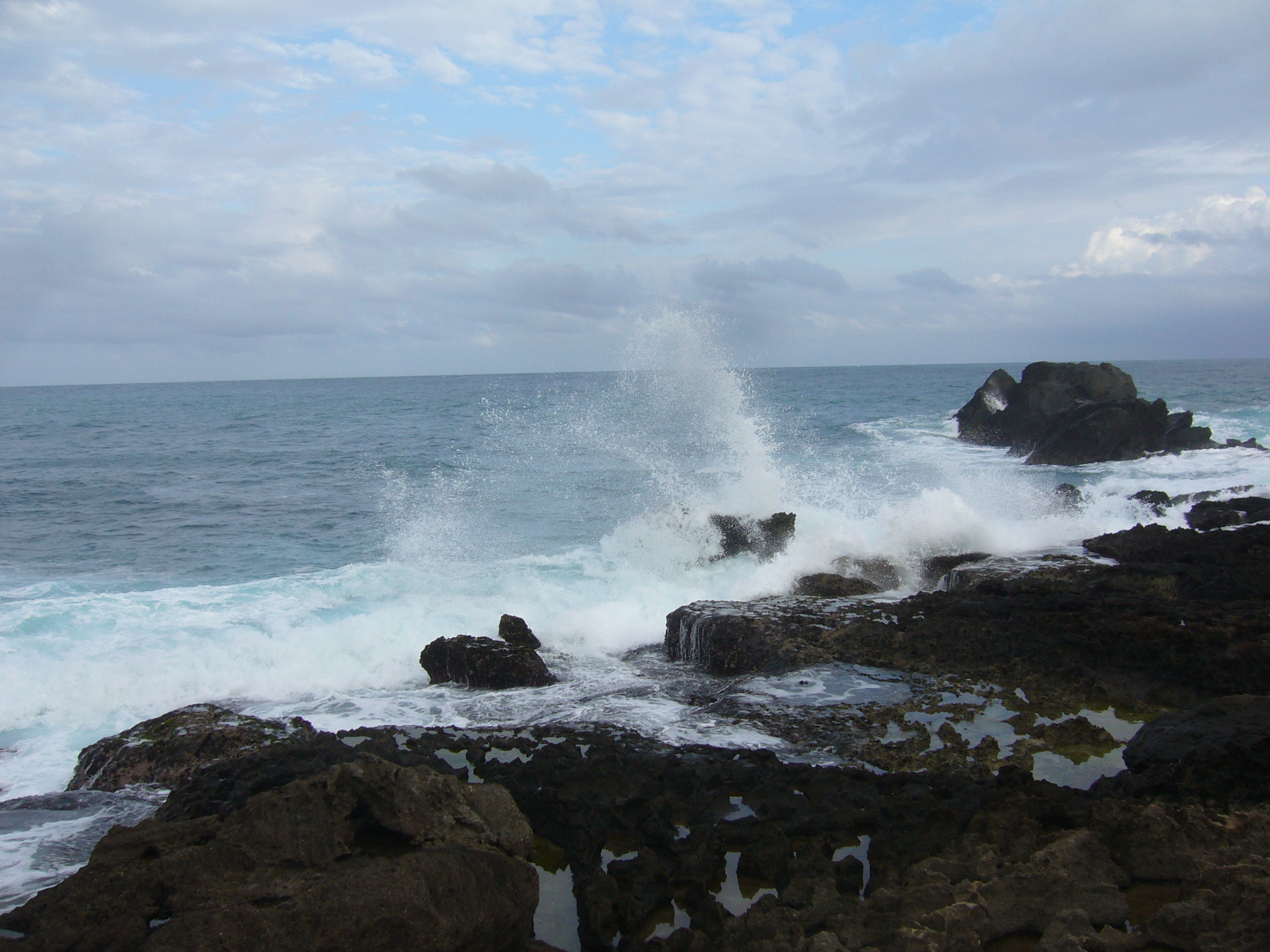 Kending National Park, Taiwan